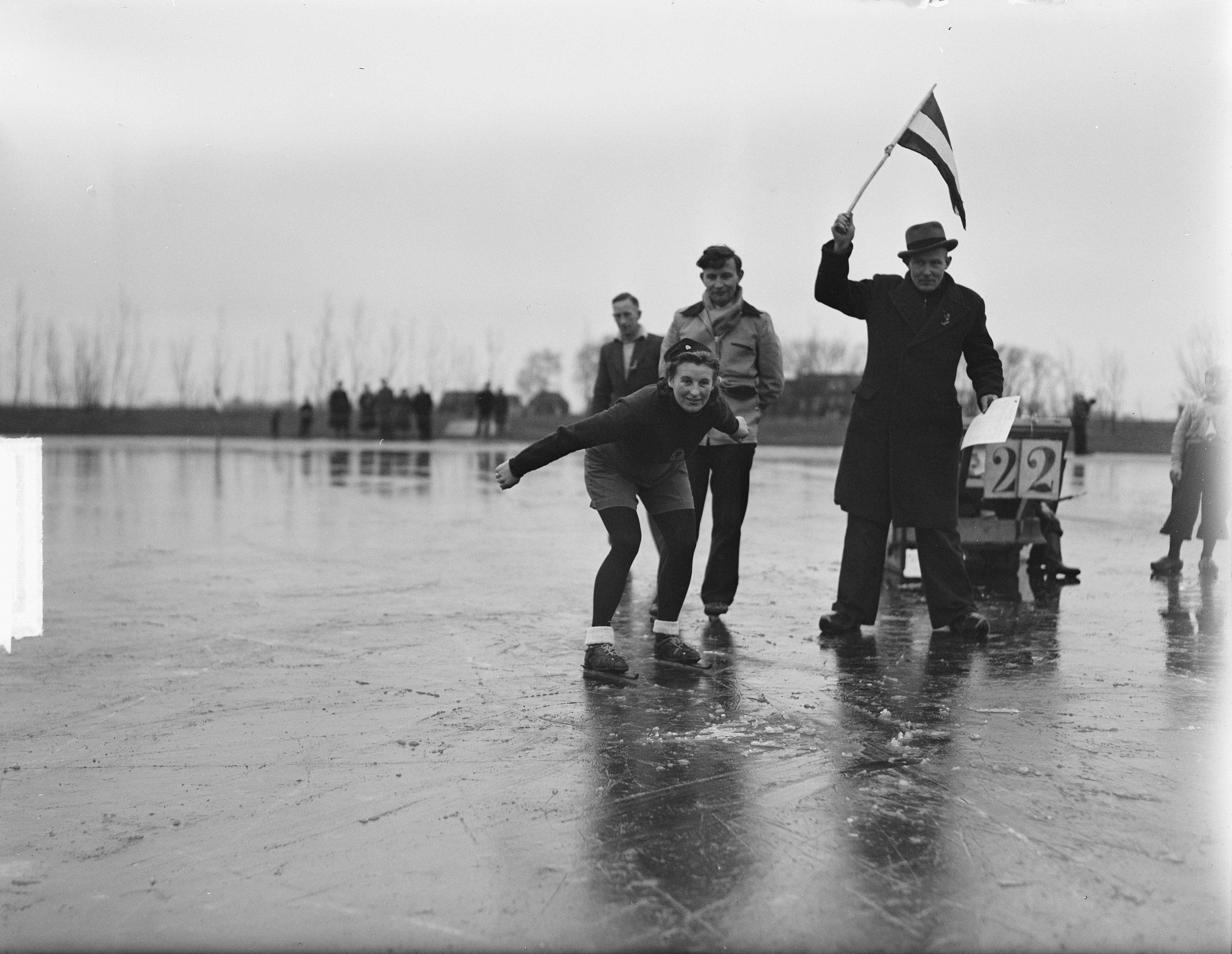 Collectie / Archief : Fotocollectie Anefo Reportage / Serie : [ onbekend ] Beschrijving : Vrouwenschaatswedstrijd Bolsward, Ike Nienhuis aan de start Datum : 21 januari 1950 Locatie : Bolsward Trefwoorden : schaatsen, sport Persoonsnaam : Nienhuis Ike Fotograaf : Oorschot, […] van / Anefo Auteursrechthebbende : Nationaal Archief Materiaalsoort : Glasnegatief Nummer archiefinventaris : bekijk toegang 2.24.01.09 Bestanddeelnummer : 903-7990